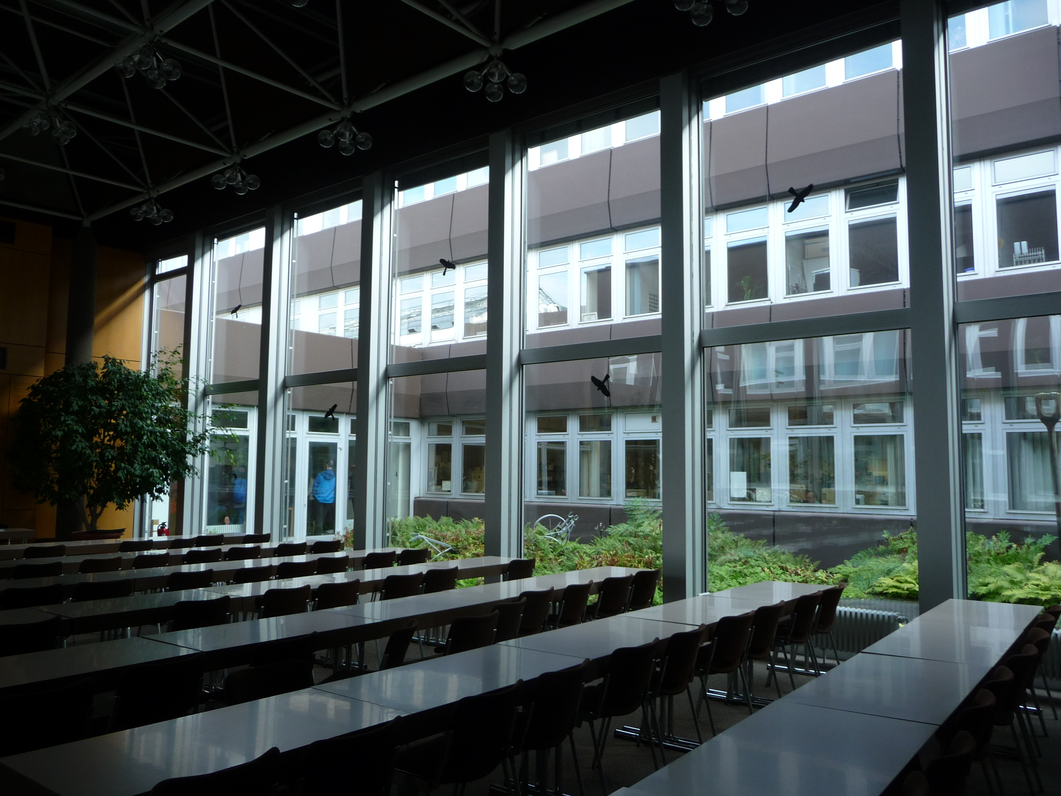 Dienstleistungszentrum Ländlicher Raum, früher Forschungsanstalt für Weinbau und Gartenbau bei Neustadt an der Weinstraße